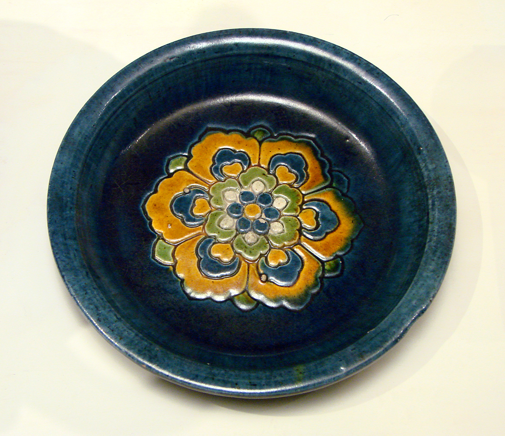 Petit plat rond à décor floral, Chine, Dynastie Tang, 8ème-9ème siècle, terre cuite "trois couleurs". Musée Guimet, Paris.